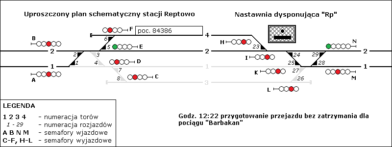 Reptowo 5 maja 1997 godz. 12:22 przygotowanie przejazdu bez zatrzymania dla pociągu "Barbakan"